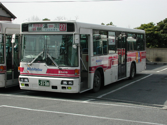 湯川営業所にて 2001-2-11 撮影